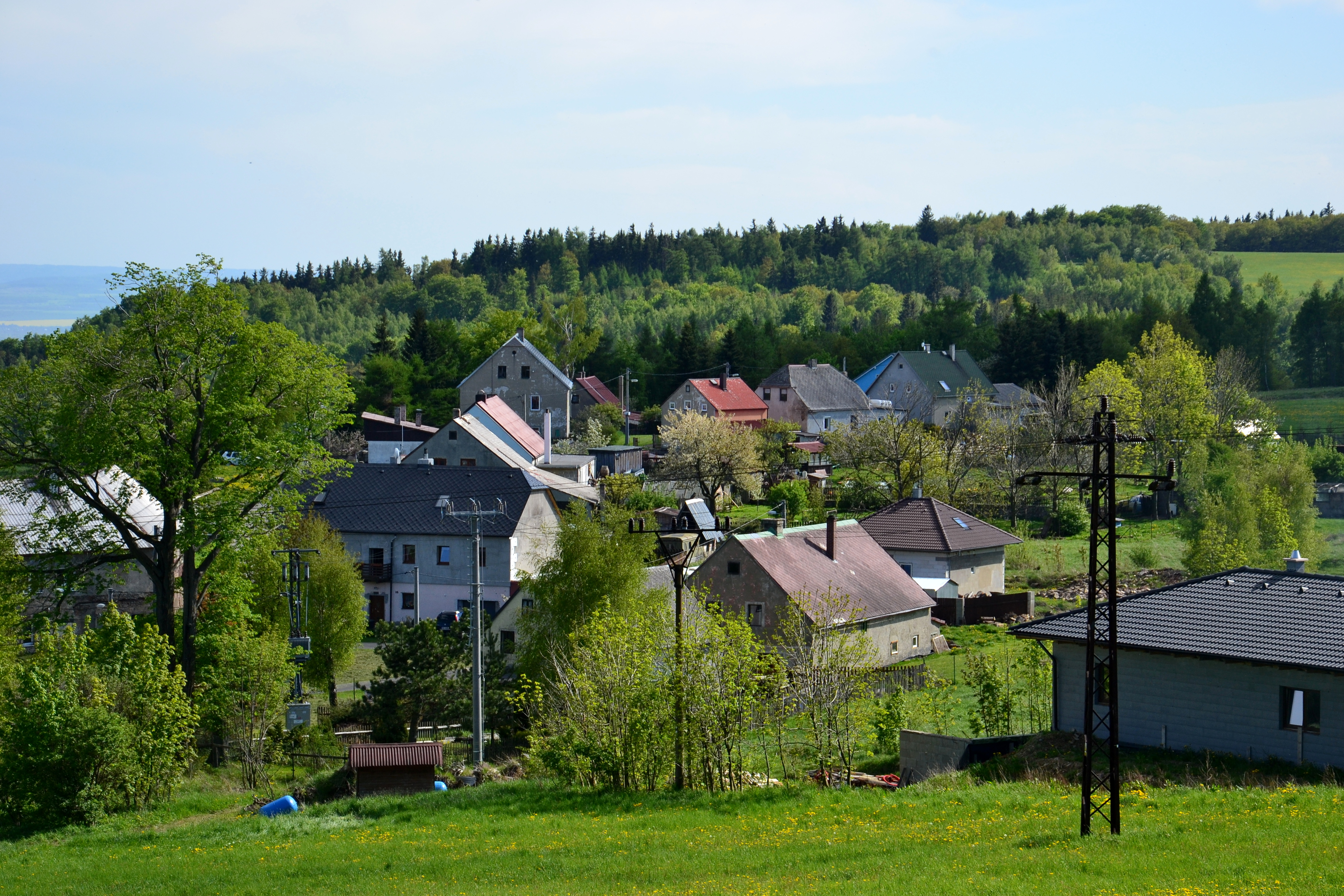 Strážky ze severu